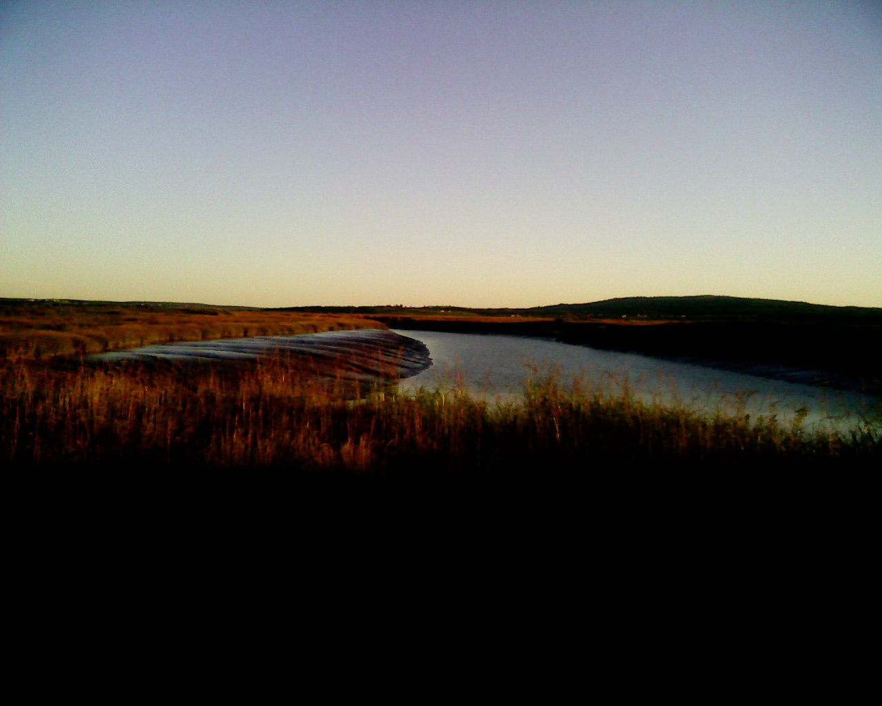 image rivière/causeway (slikkes)